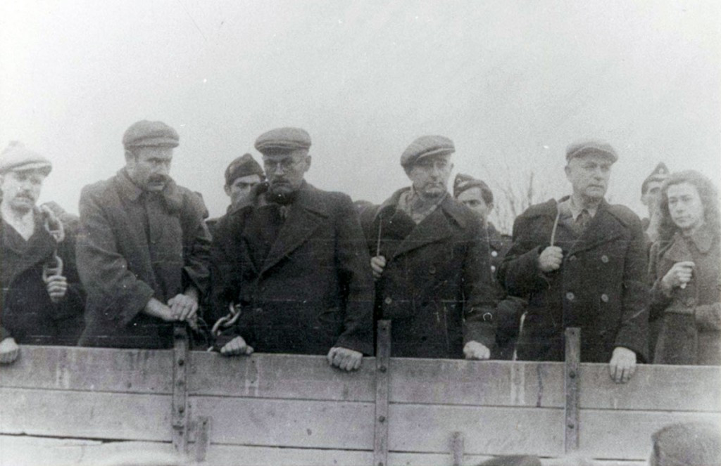 СтефанСимеонов преди разстрел